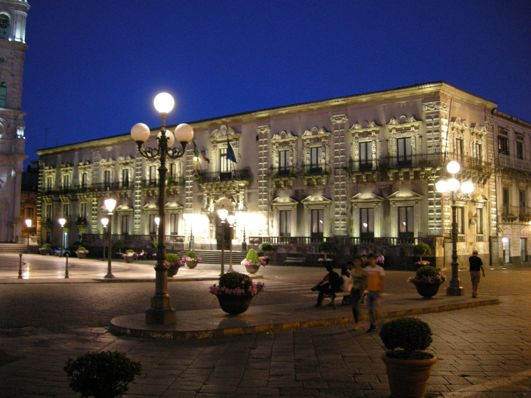 Acireale, palazzo di città